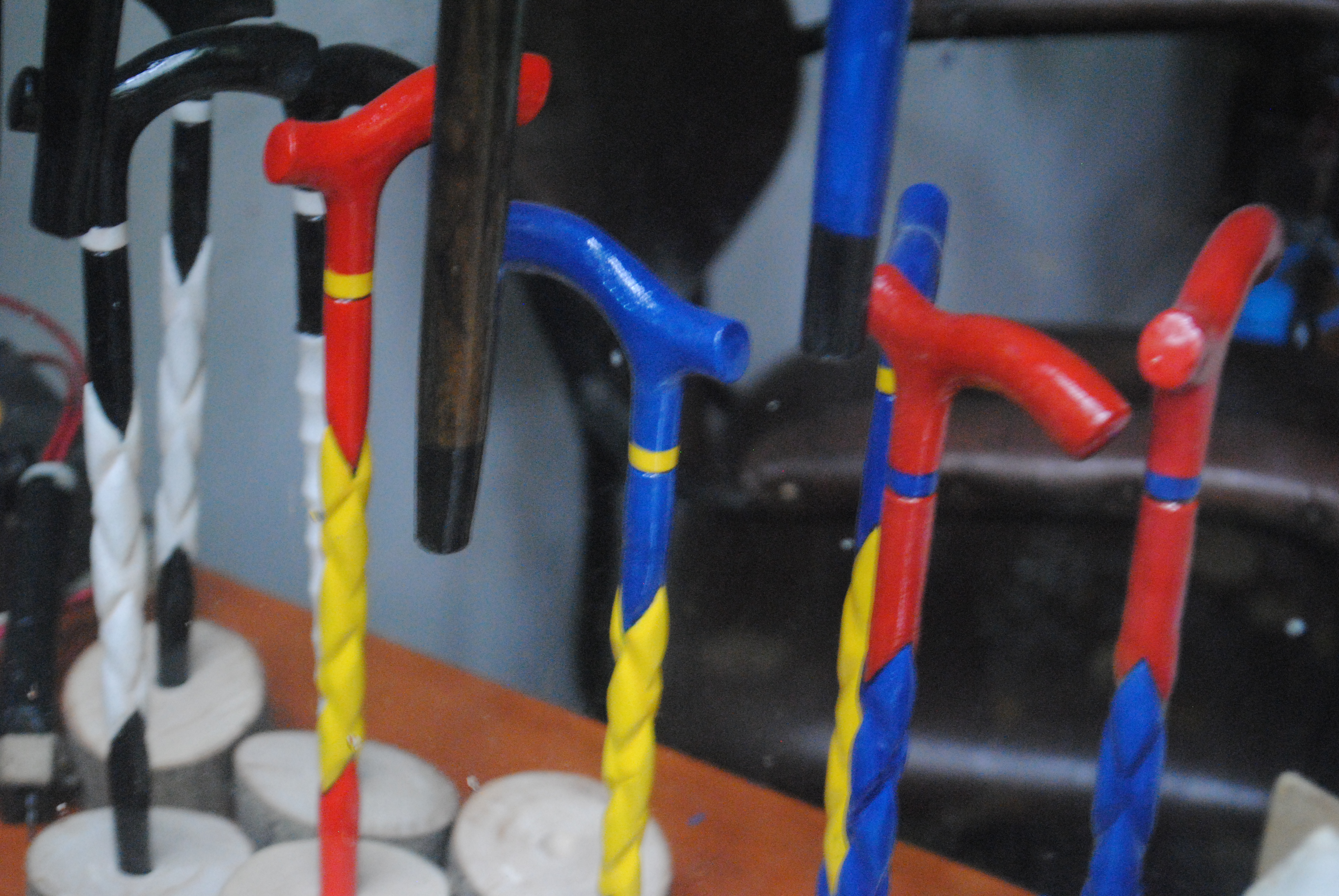 Devrek'ten çeşitli görüntüler